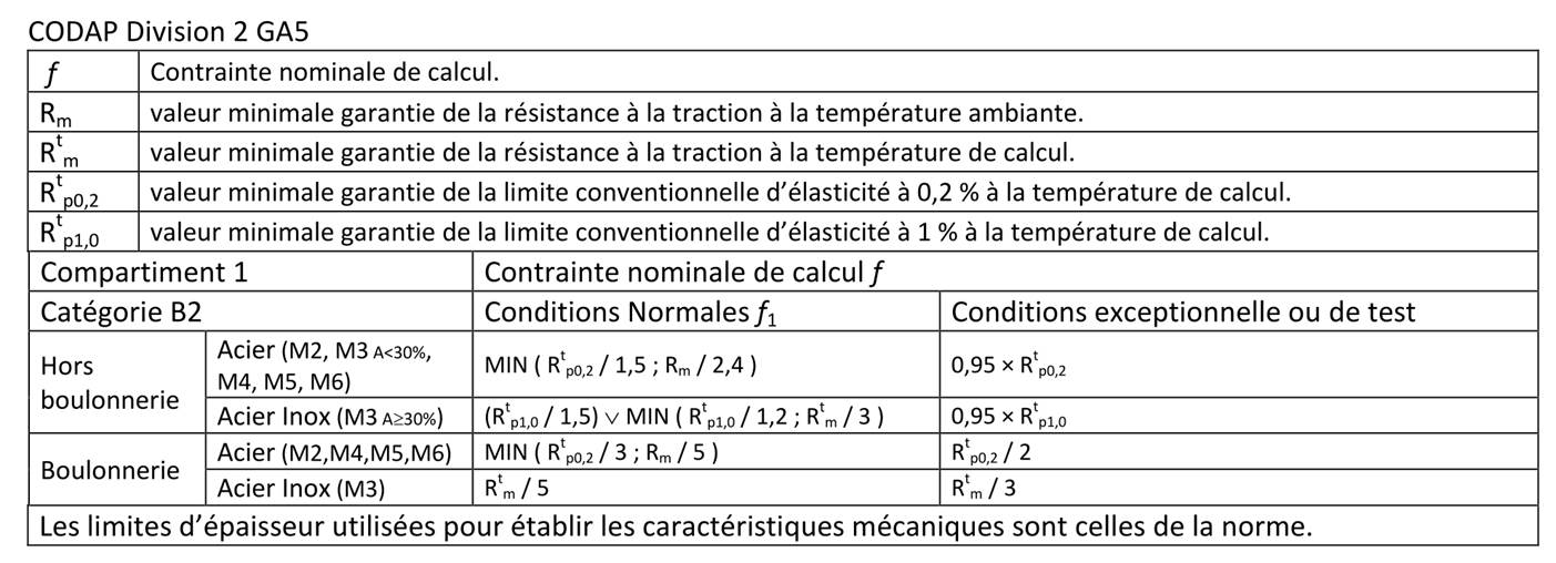 Principe : le calcul consiste à vérifier que les contraintes dans l'appareil sous pression restent inférieures à la contrainte de calcul.